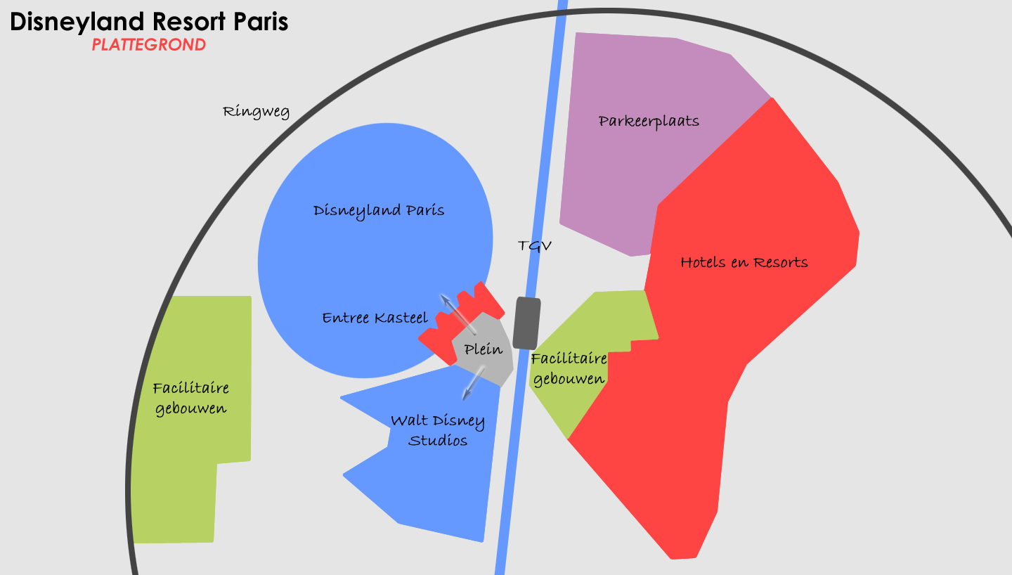 Zelfgemaakt op basis van een zelfgemaakte luchtshot. Hierbij bied ik deze plattegrond aan in het publiek domein.